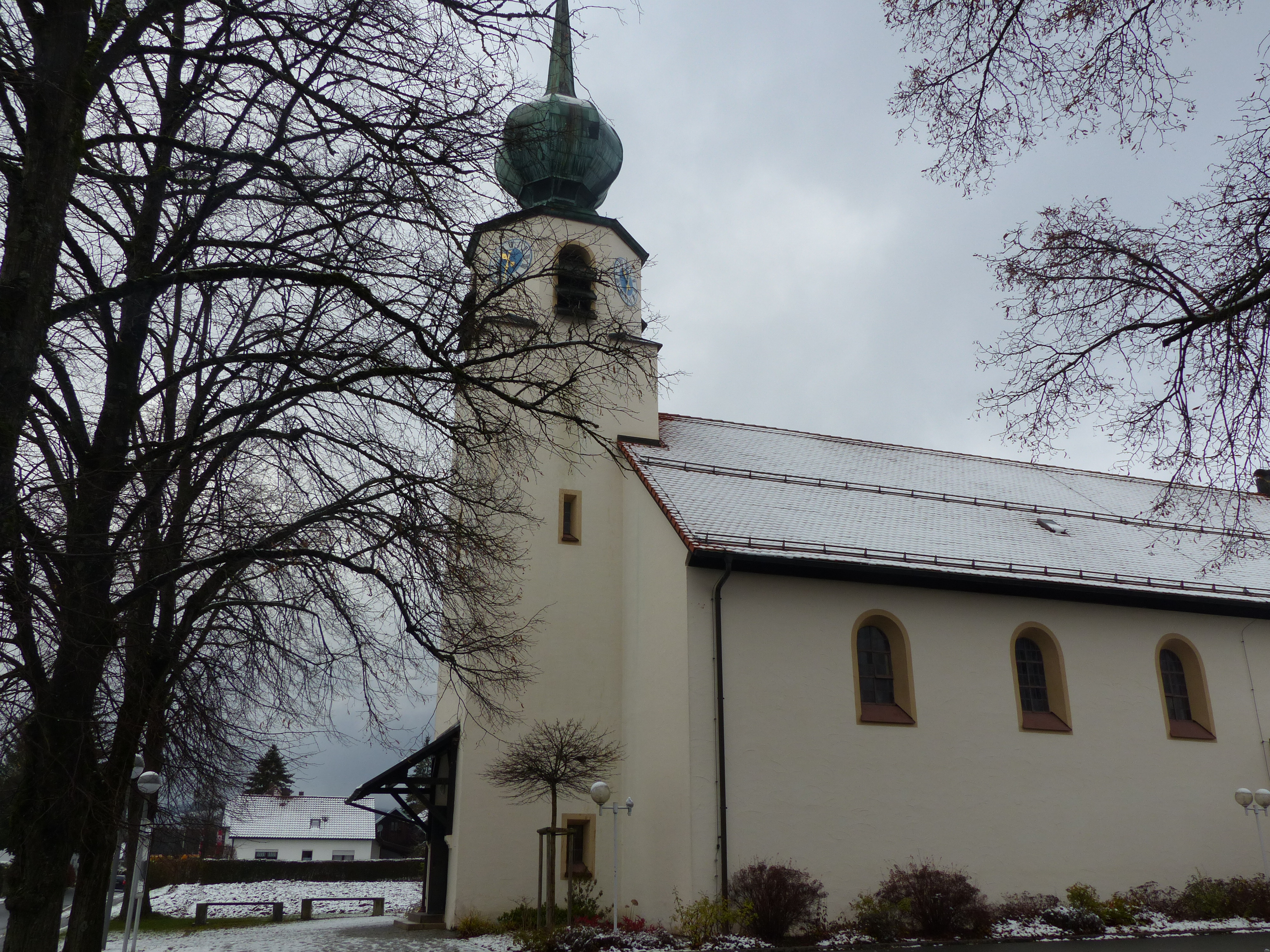 Langbau und Turm